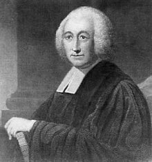 Engraving of Henry Melchior Muhlenberg